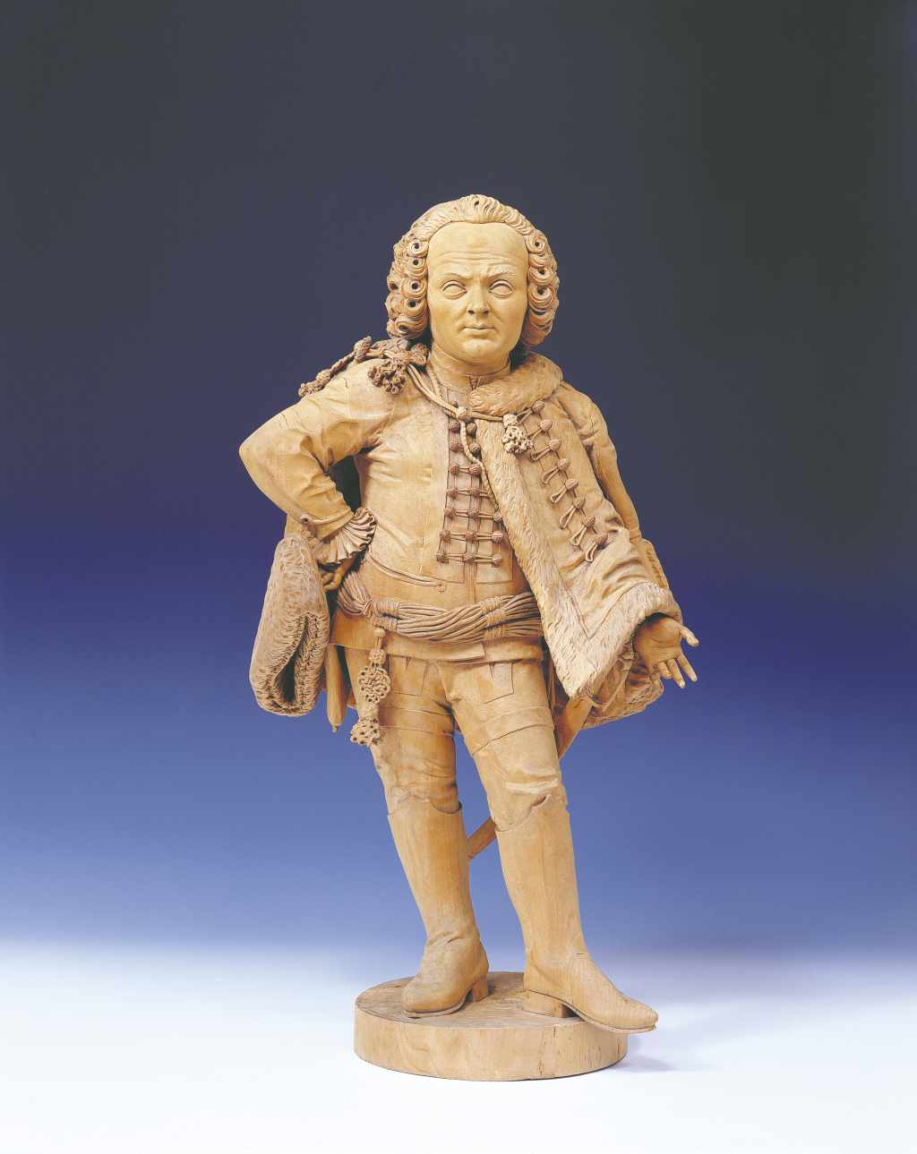 Zwergpage Oswald Eyberger, zw. 1745-1752, Lindenholz, Stiftssammlung Admont